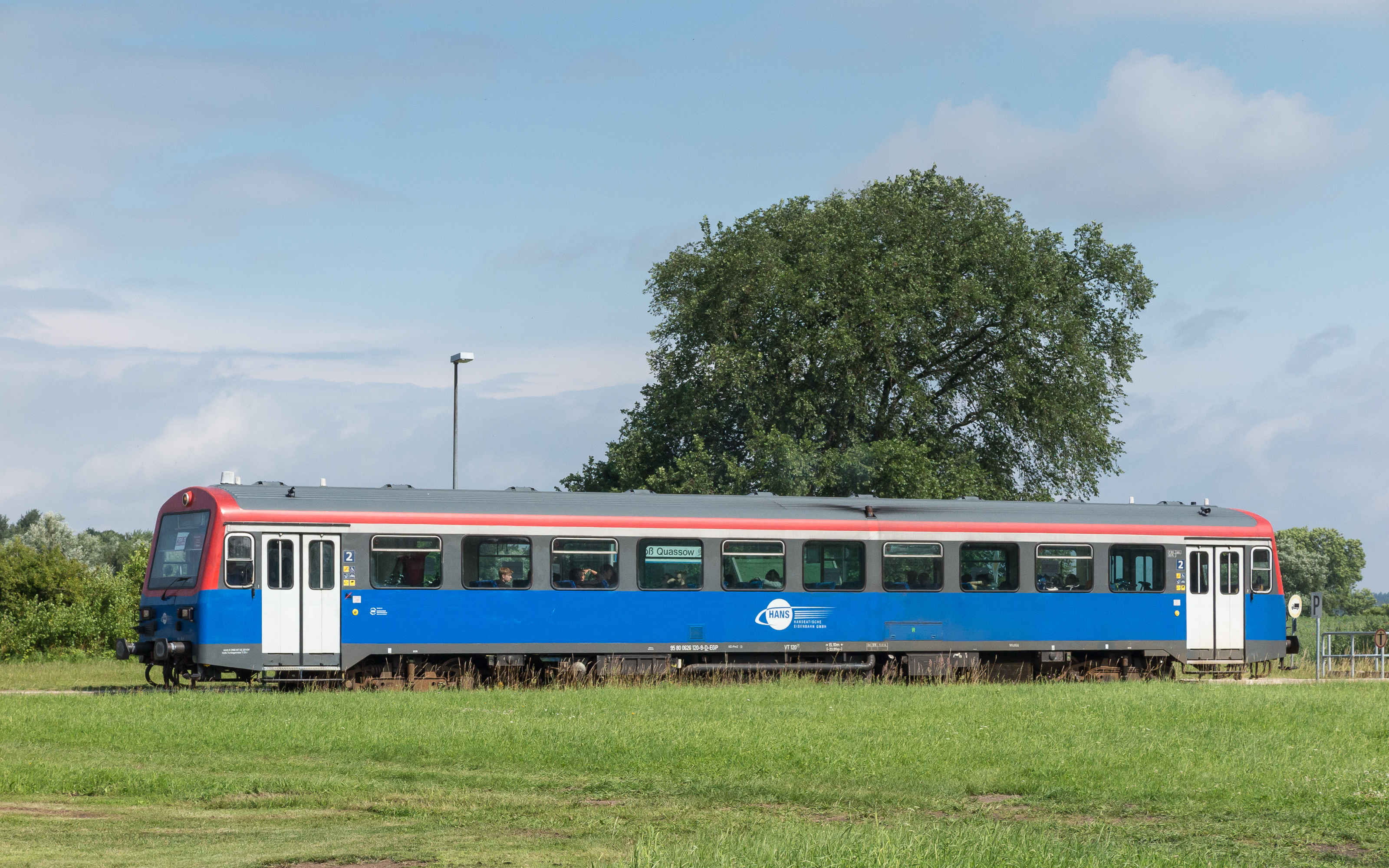 VT 120 der Hanseatischen Eisenbahn GmbH auf der Kleinseenbahn am Haltepunkt Groß Quassow